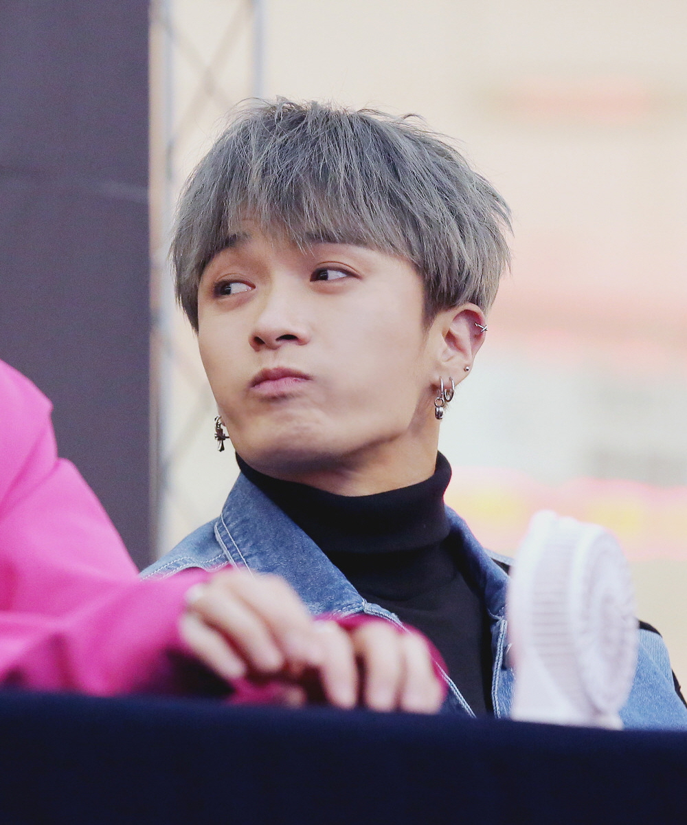 170504 젝스키스 팬사인회 은지원 이재진 김재덕 강성훈 장수원